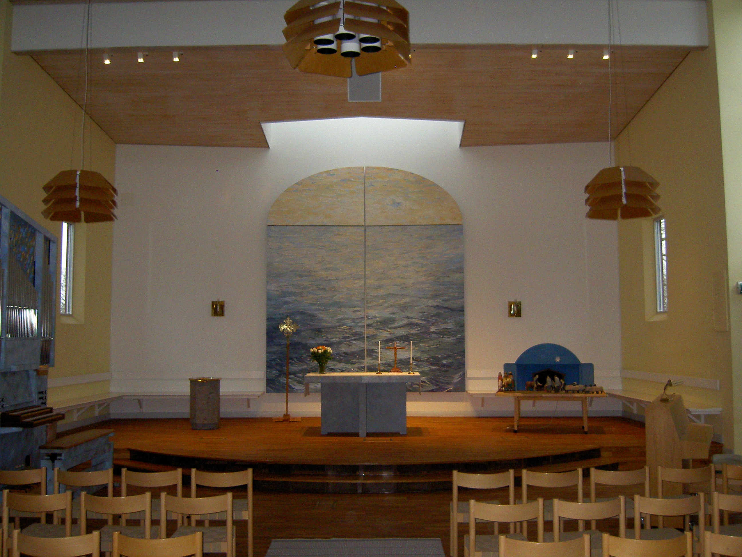 Kyrksal i Sävja kyrka